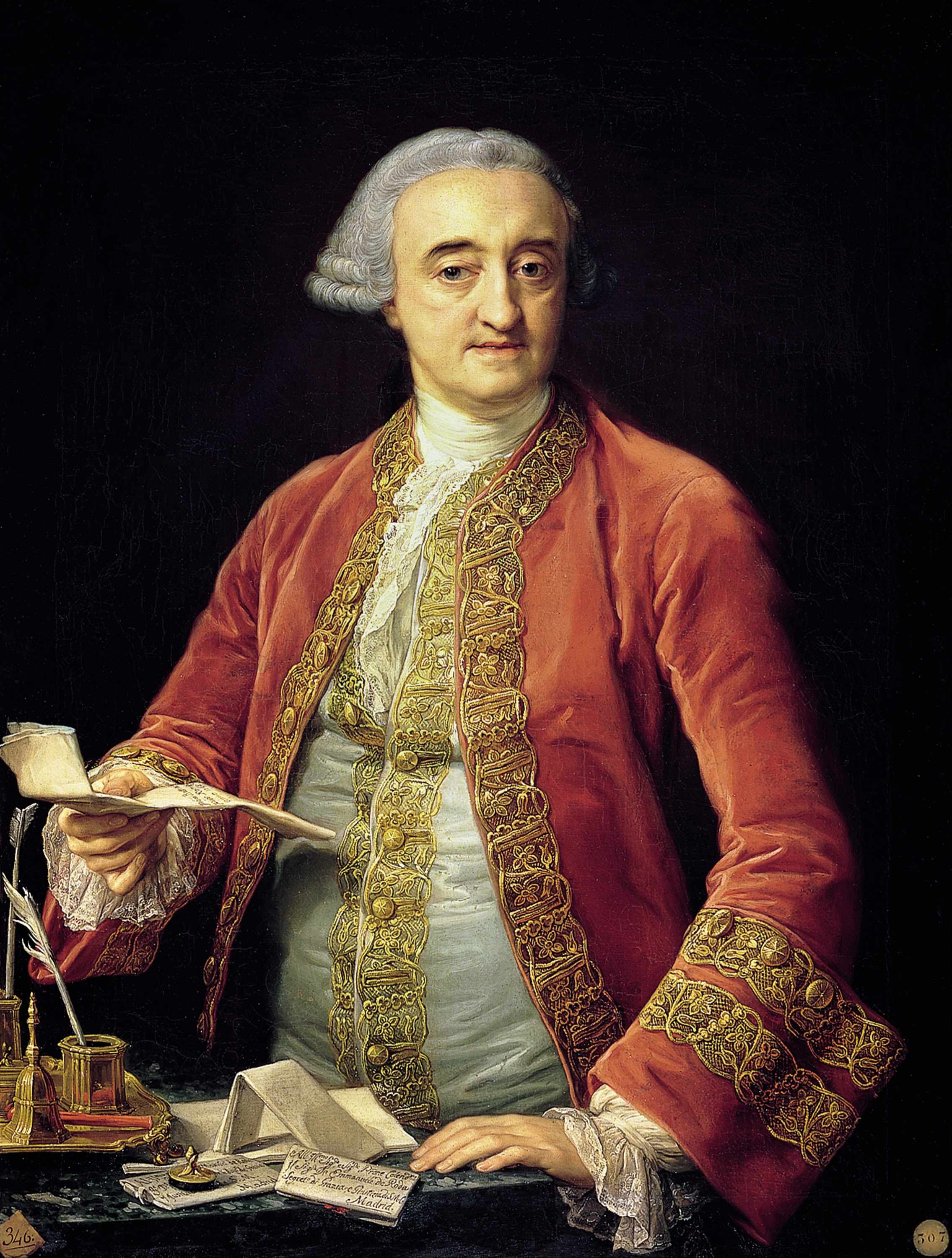 Retrato del politico español Manuel de Roda y Arrieta (1708-1782), que jugó un papel decisivo en la Expulsión de los jesuitas del reino de España llevada a cabo en 1767, durante el reinado de Carlos III de España.